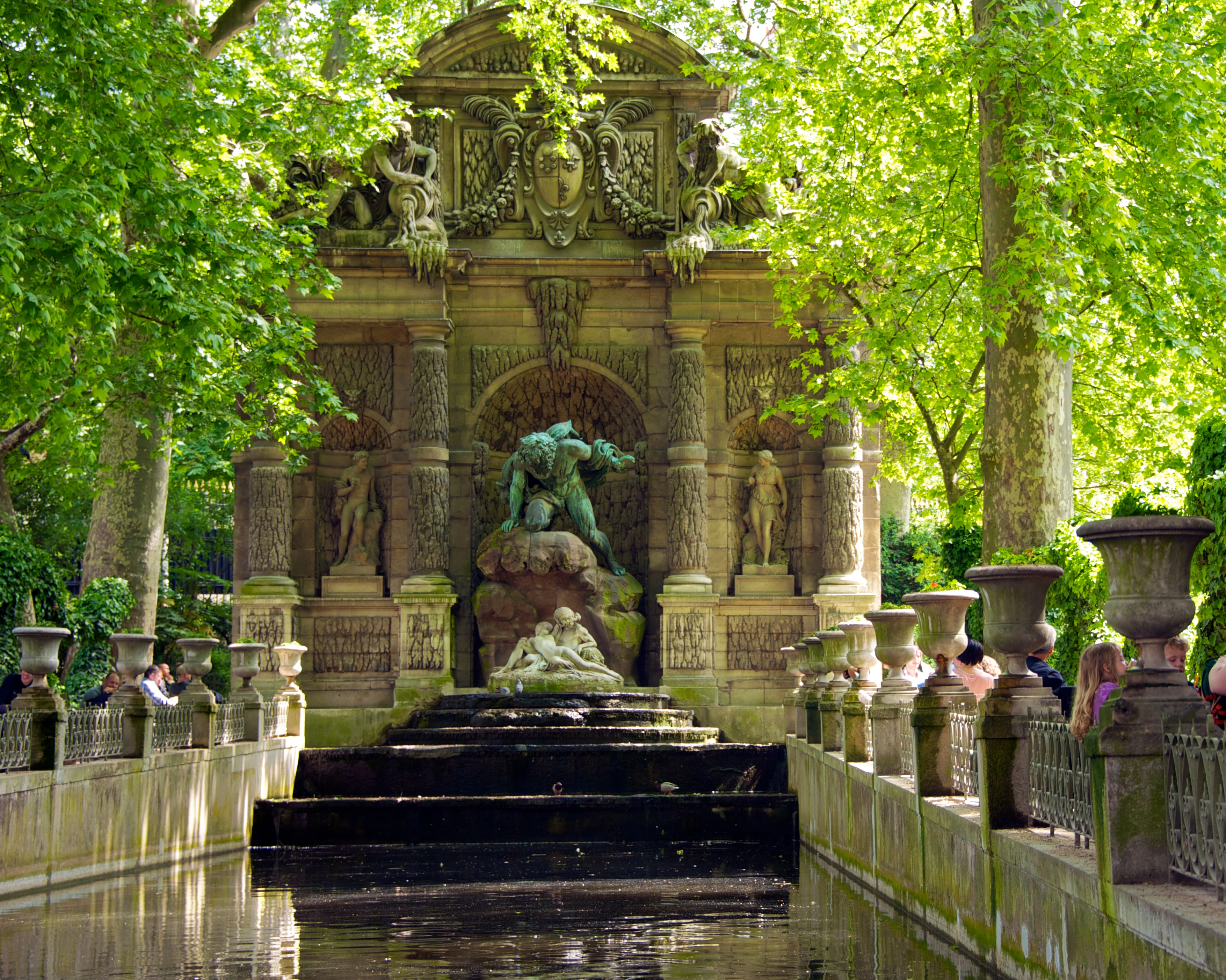 France 2011 - 8